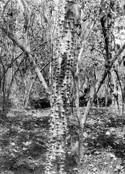 Negatief. Stam van een slecht onderhouden boom in een koffietuin van Coffea Arabica